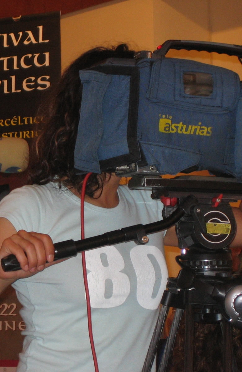 Camarógrafu de TeleAsturias nuna rueda de prensa.